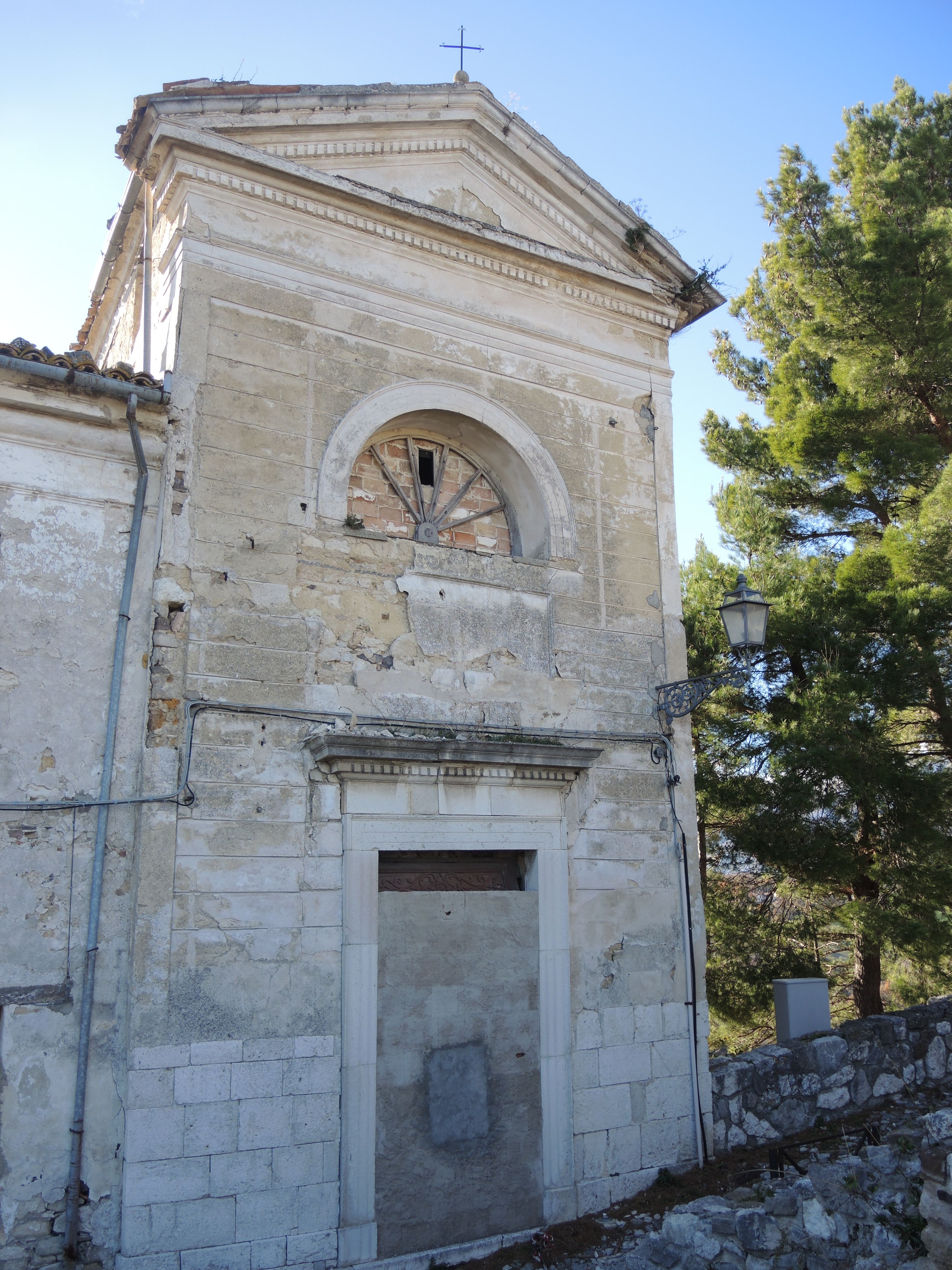 Gessopalena: Chiesa di Sant'Antonio